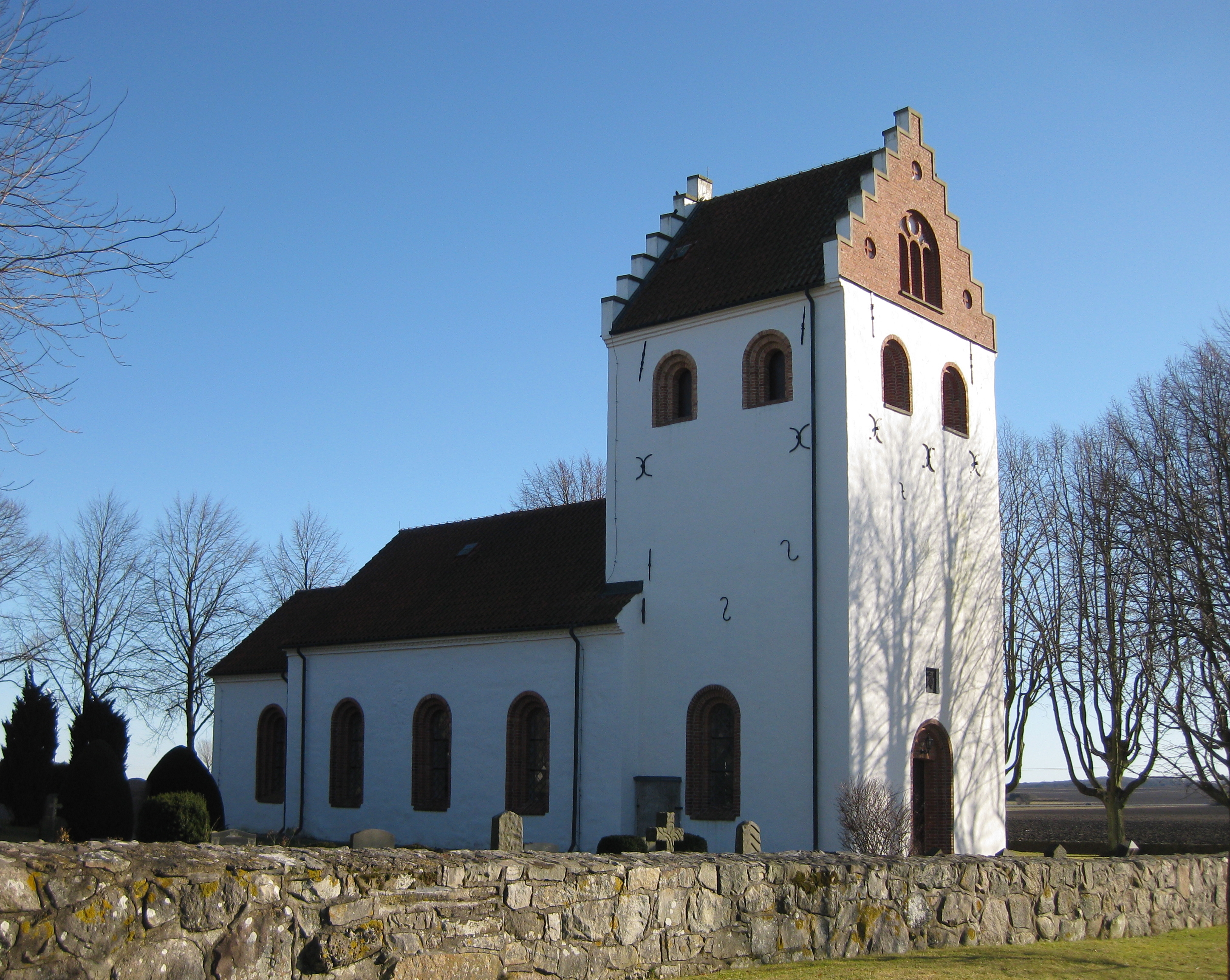 Igelösa kyrka i Skåne